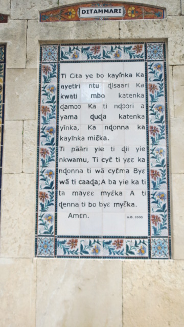 Church of the Pater Noster, Mount of Olives, Jerusalem כנסיית אבינו שבשמים Sanctuary of the Eleona